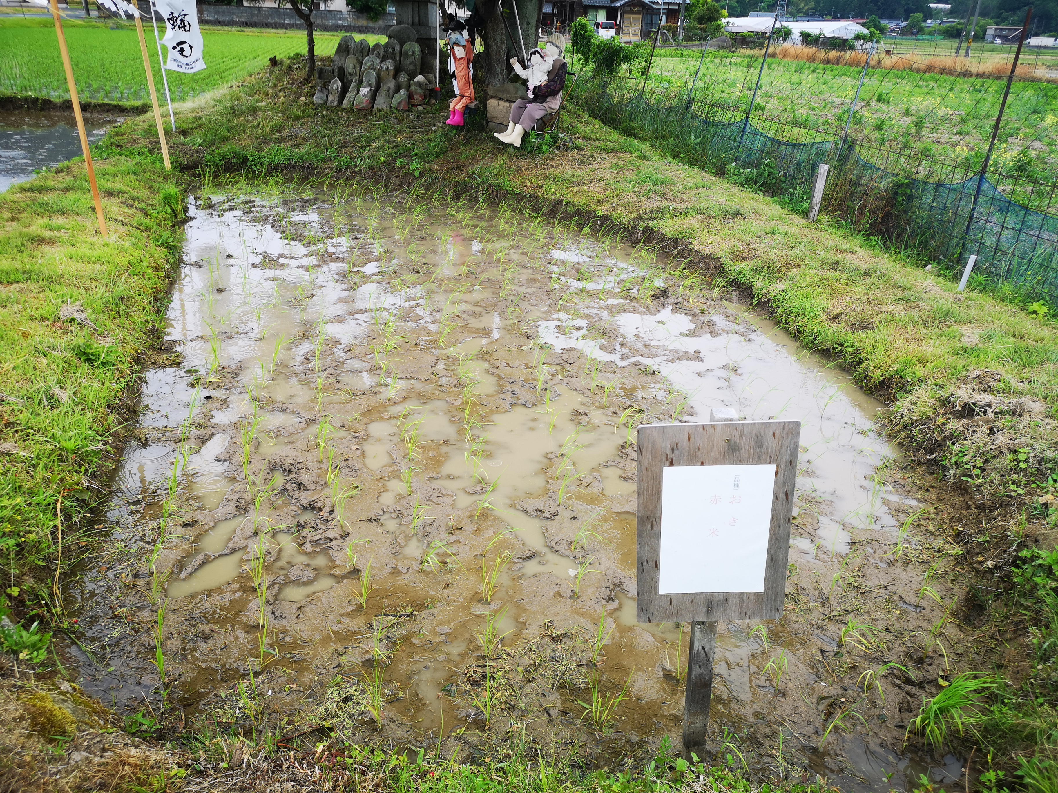 京丹後市峰山町の「月の輪田」。稲作発祥の地の伝承がある。